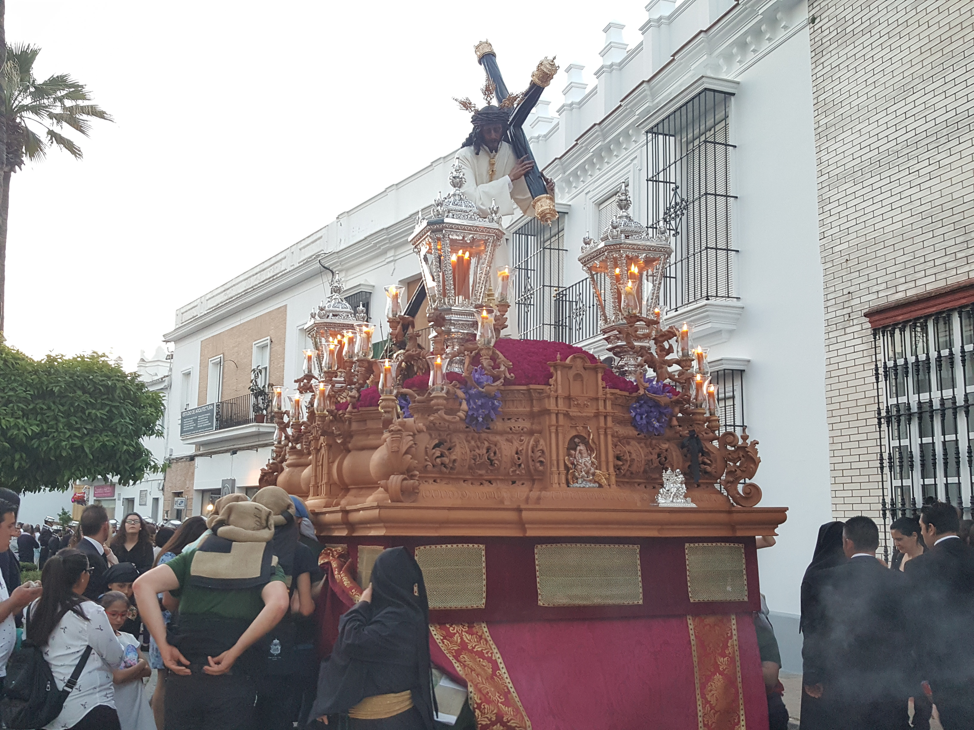 Hermandad del Cristo de la Victoria. Desfile procesional del Miércoles Santo. Vista de paso del Cristo de la Victoria por el casco urbano de Moguer.